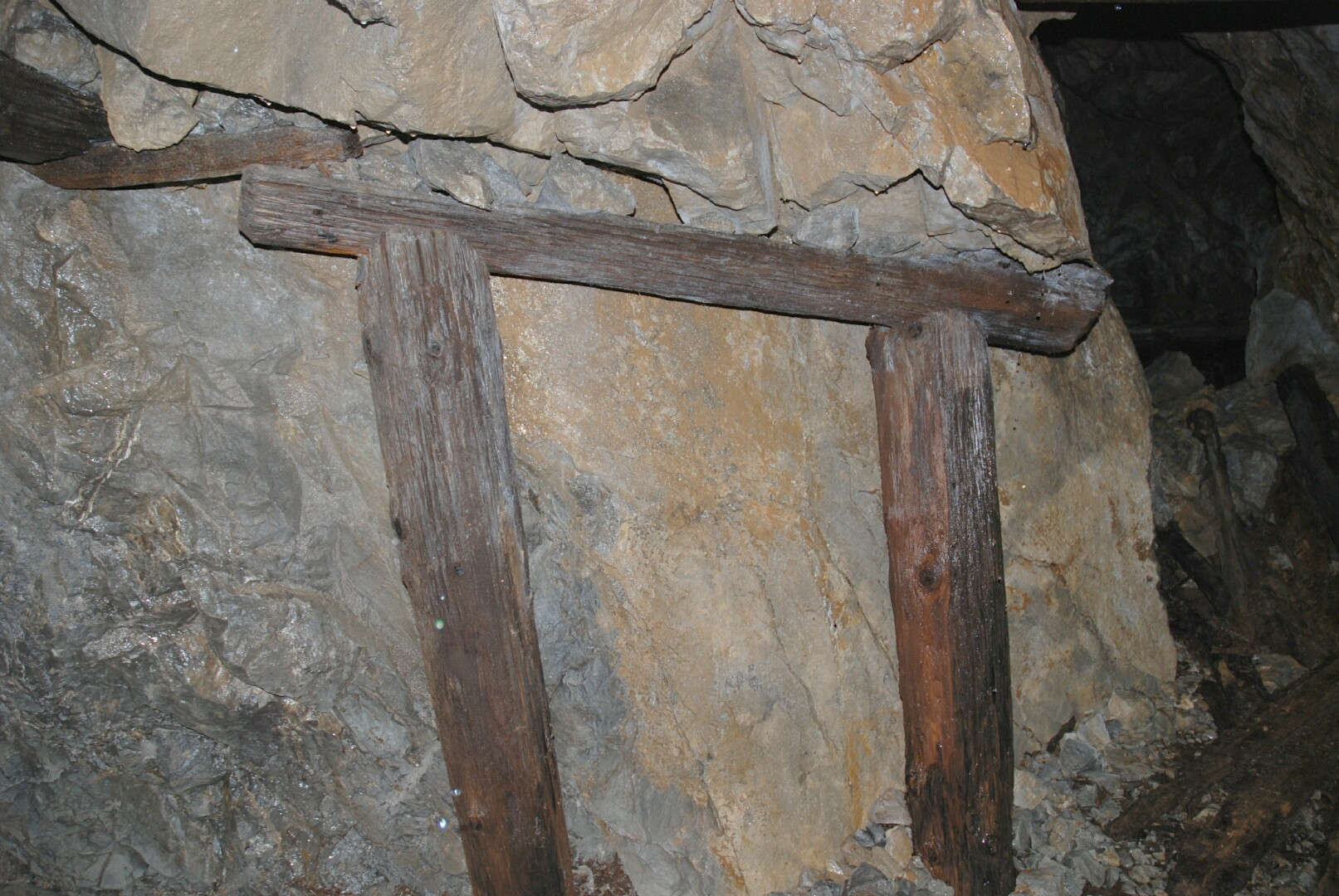 Stützelement in der St. Joachimsfundgrube des Silberbergwerk Annaberg in Österreich